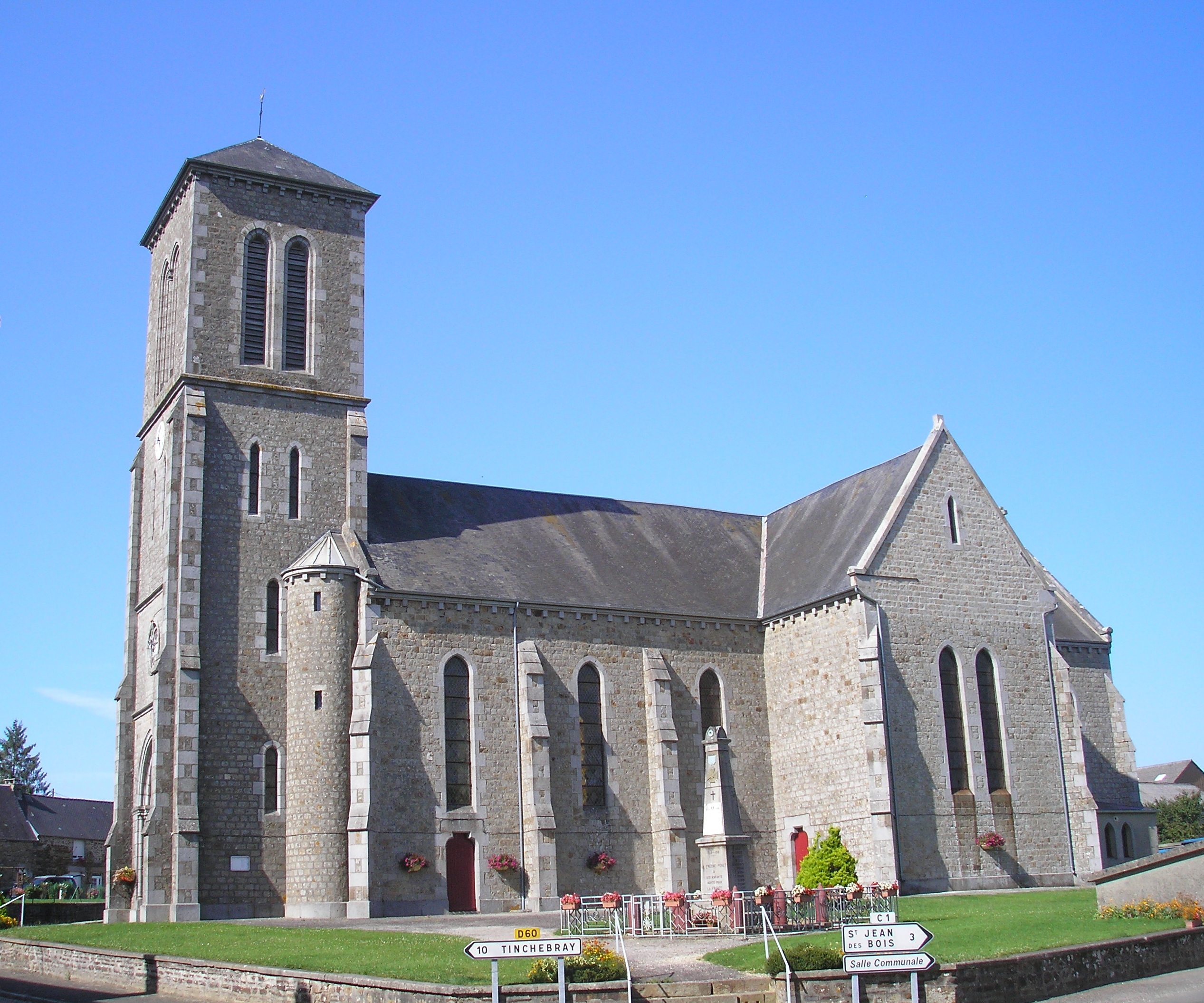 Le Fresne-Poret (Normandie, France). L'église Saint-Jean-Baptiste.